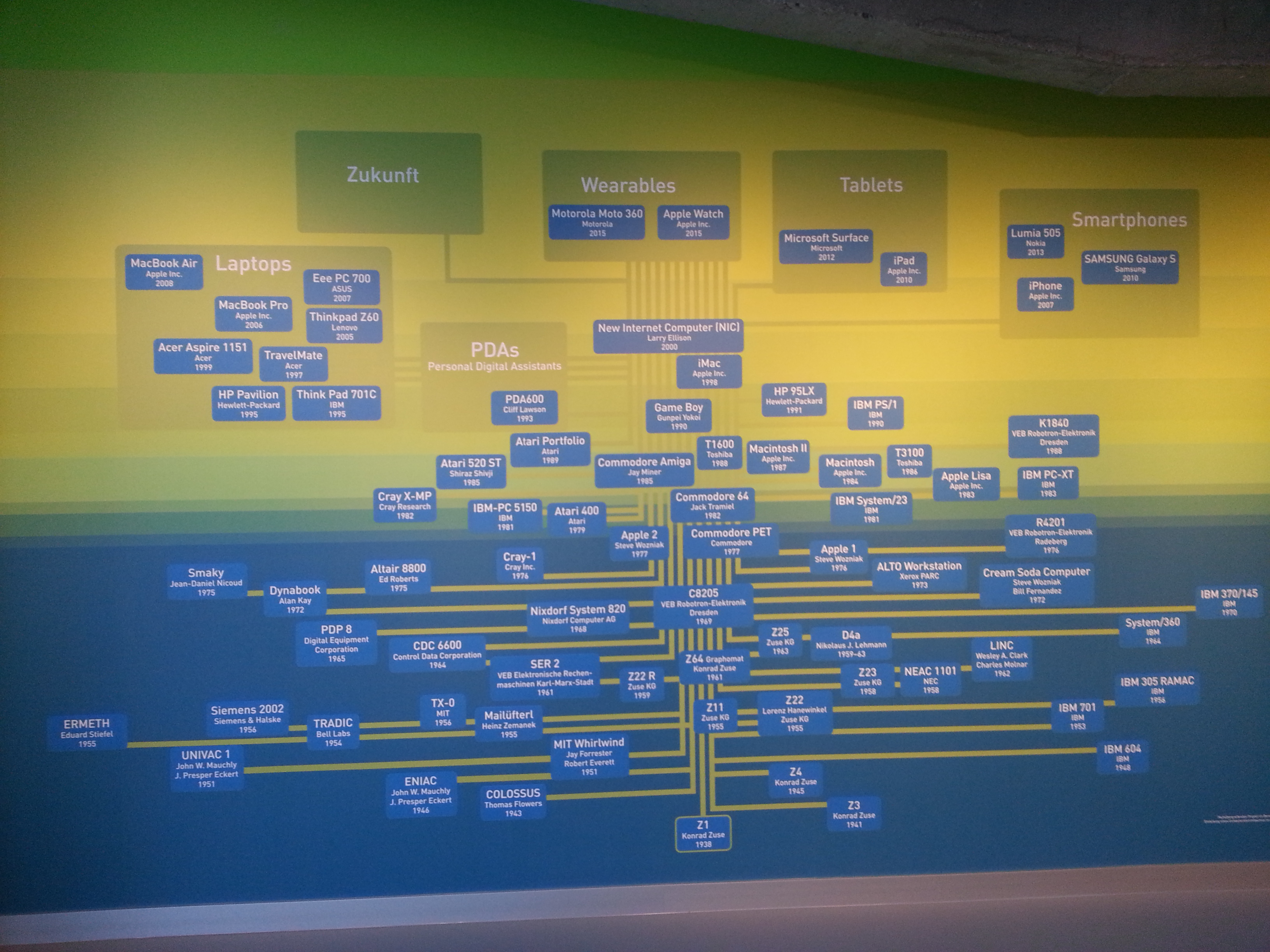 Meilensteine der Computerentwicklung. Aufgenommen im ZCOM - Stand: Ausstellungseröffnung Anfang 2017